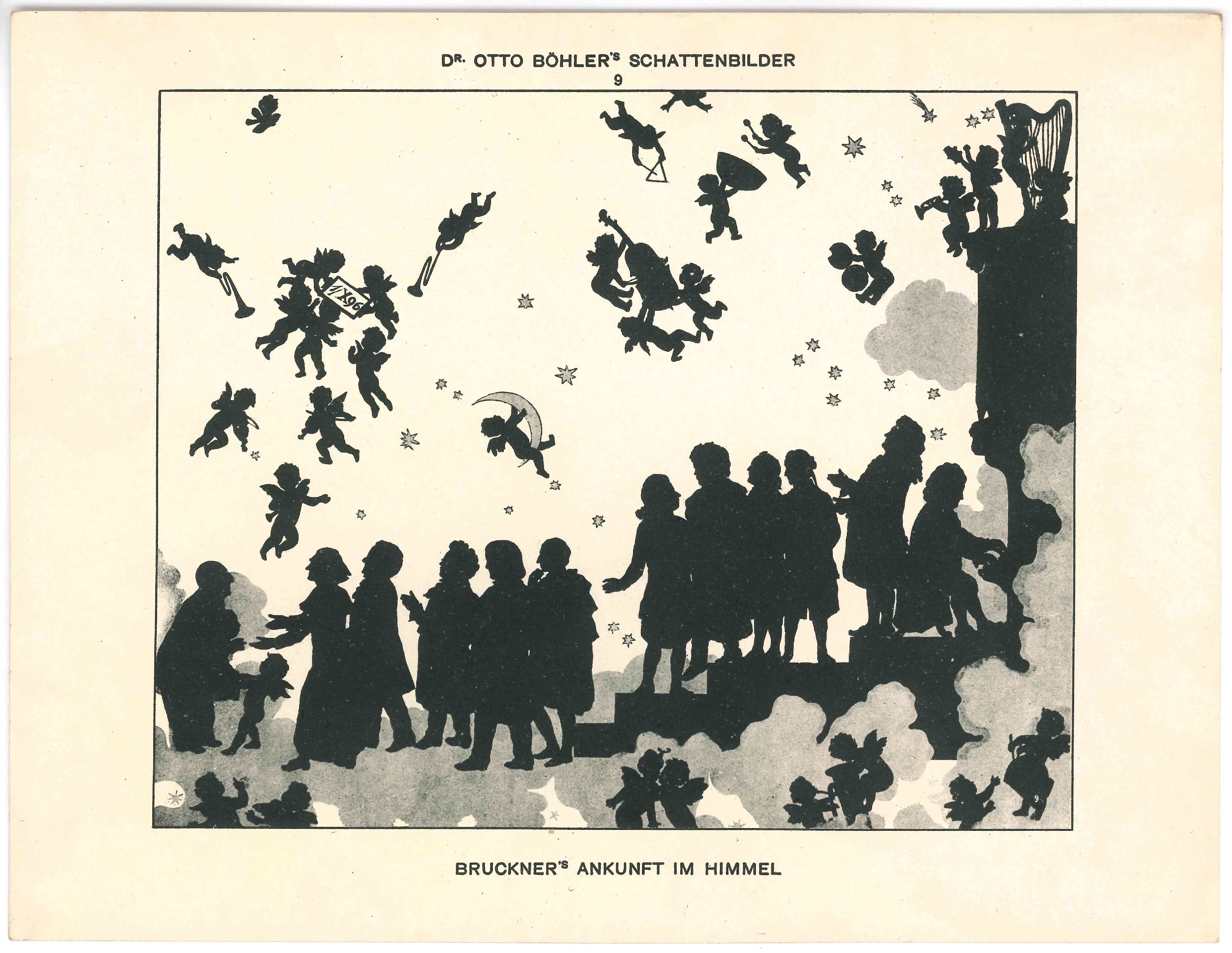 Bruckner´s arrival in heaven, silhouette 20 x 26 cm; photo of Böhler´s silhouette printed on thick card fltr: Anton Bruckner, Franz Liszt, Richard Wagner, Franz Schubert, Robert Schumann, Carl Maria von Weber, Wolfgang Amadeus Mozart, Ludwig van Beethoven, Christoph Willibald Gluck, Joseph Haydn, Georg Friedrich Händel und Johann Sebastian Bach